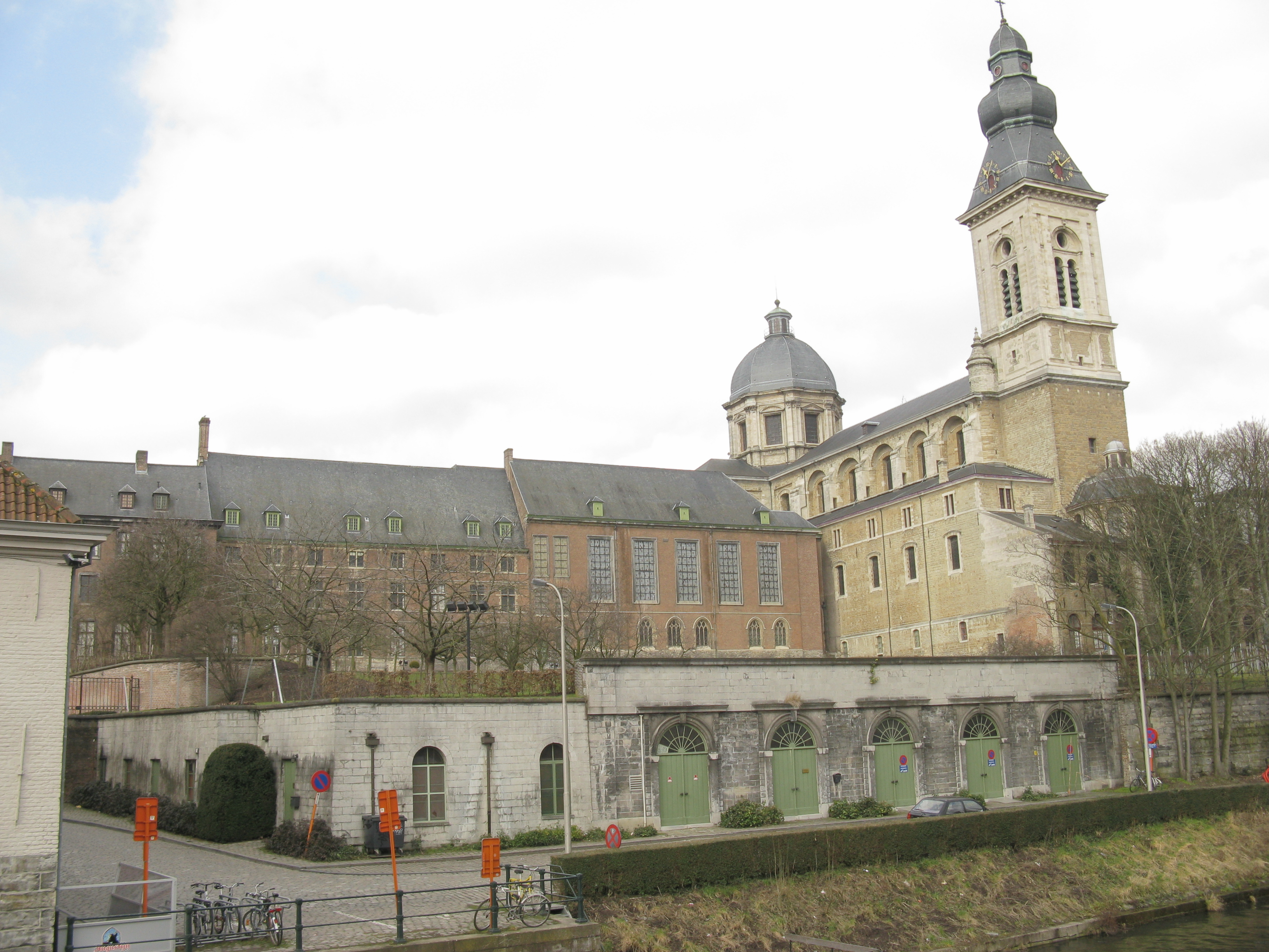 De Sint-Pietersabdij aan de oever van de Schelde in Gent, gezien vanaf de Muinkaai.